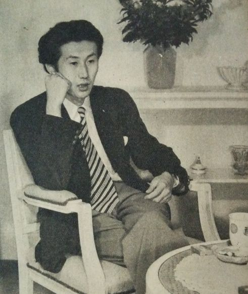 団伊玖磨